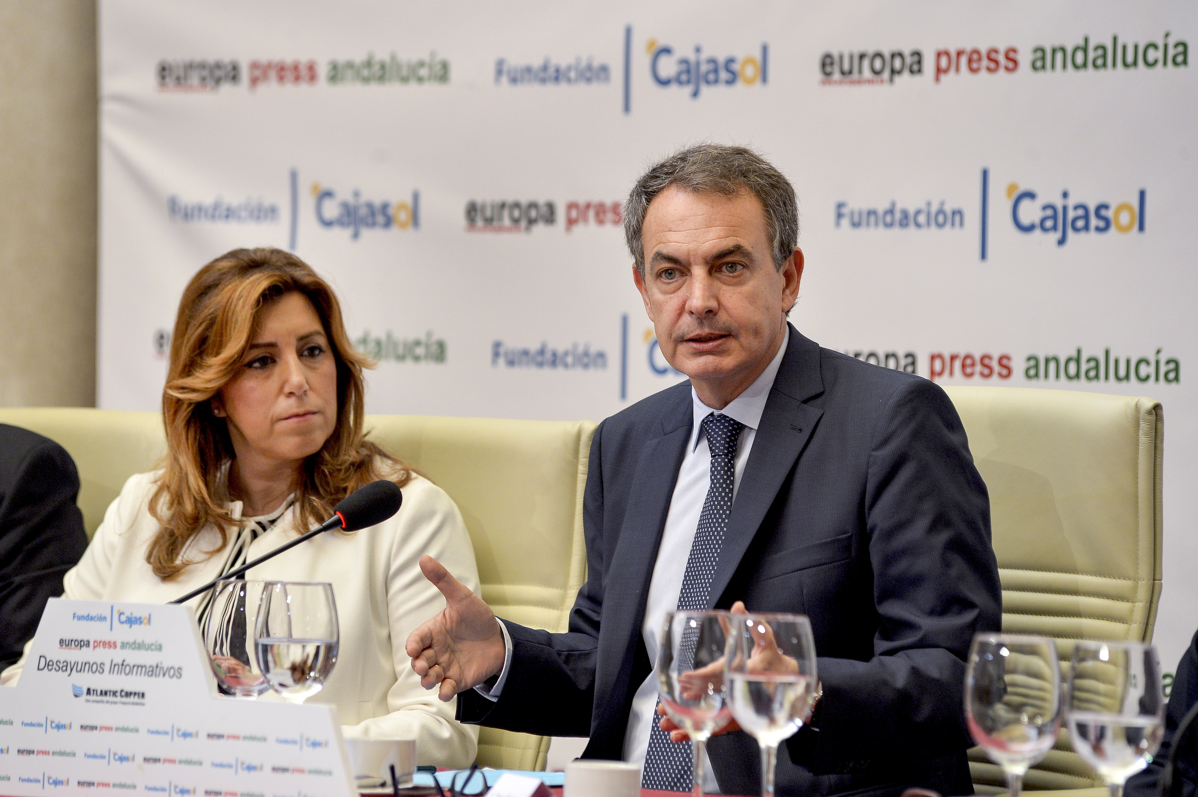 15.10.14-Desayuno-9-Zapatero